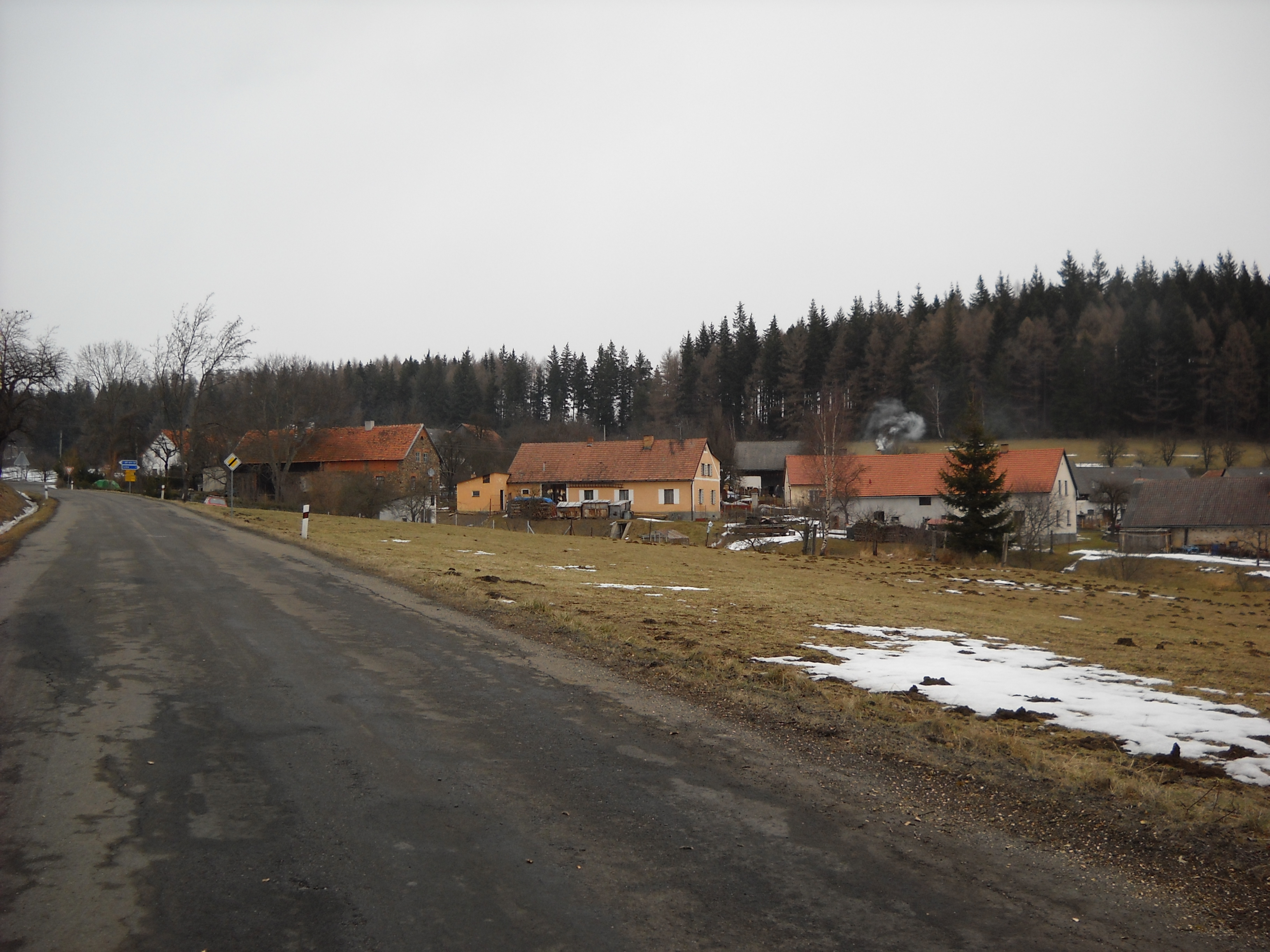 Obec Cihelna ze silnice z Hlavňovic.